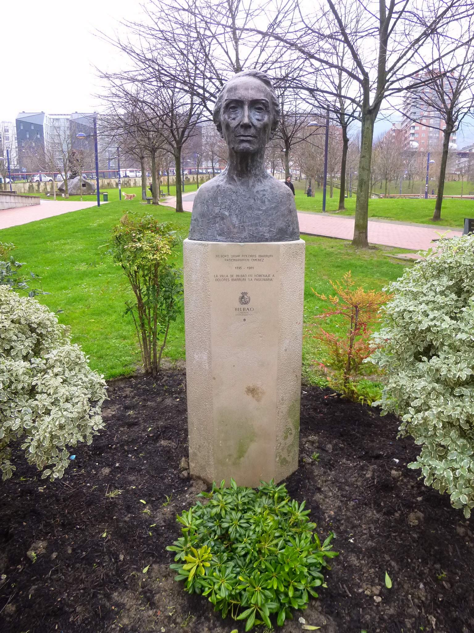 Bilbao - Parque de Ametzola - Monumento a Pasionaria